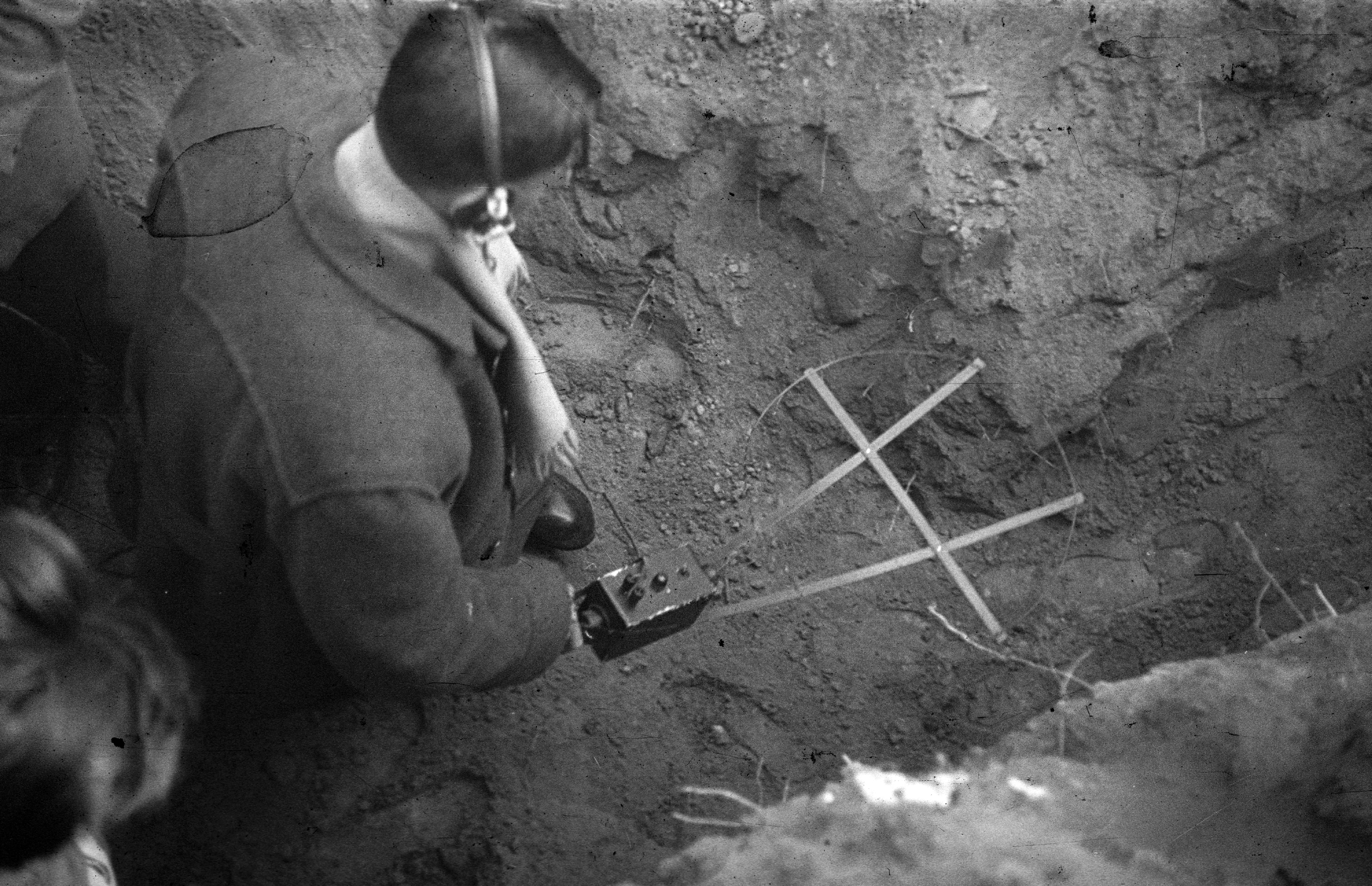 II. János Pál (Köztársaság) tér, a pártházhoz kötődő feltételezett kazamaták keresése. Location: Hungary, Budapest VIII. Tags: revolution, instrument, man, Budapest Title: II. János Pál (Köztársaság) tér, a pártházhoz kötődő feltételezett kazamaták keresése.